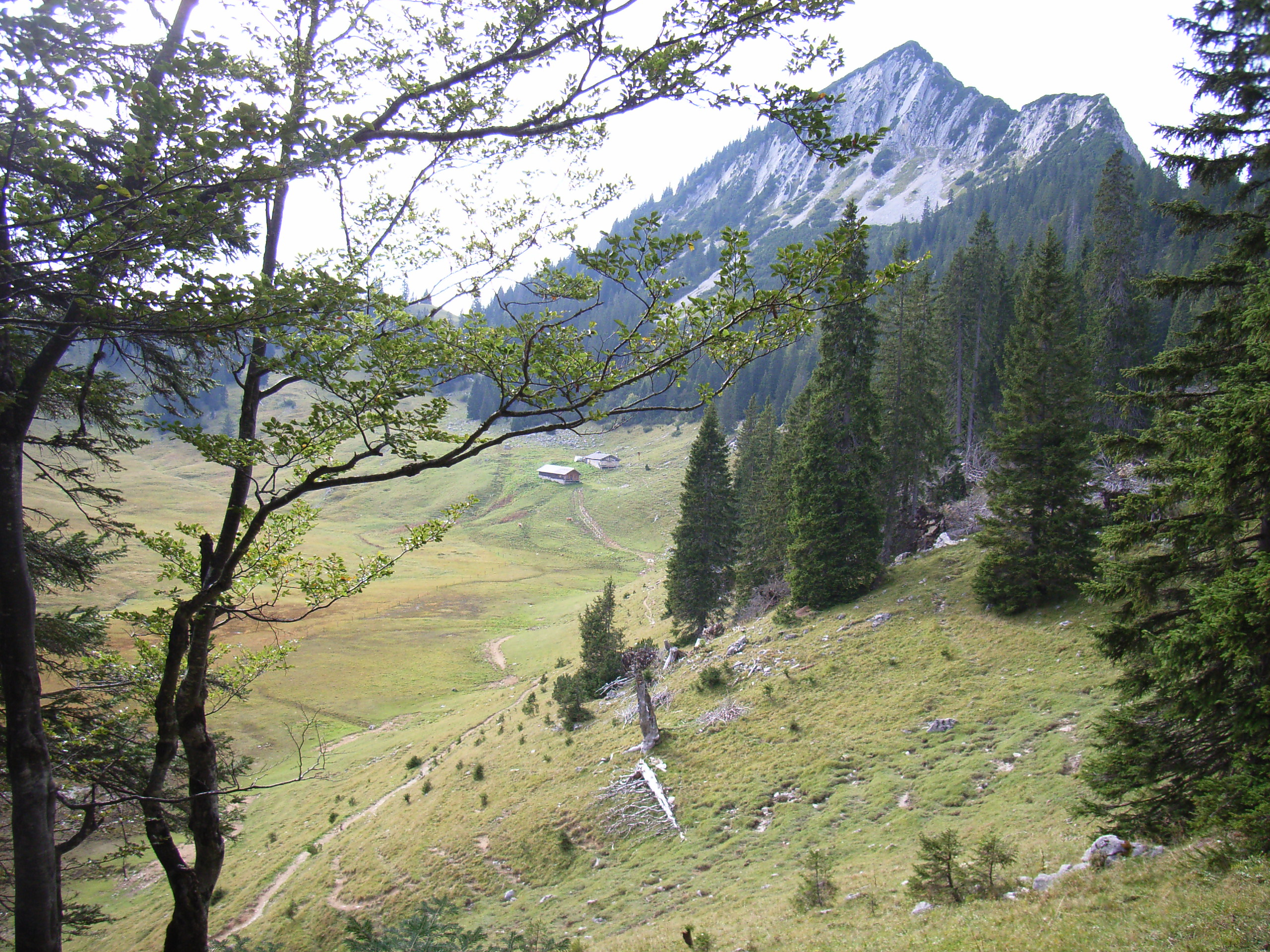 Die Bayerische Wildalm in den Brandenberger Alpen